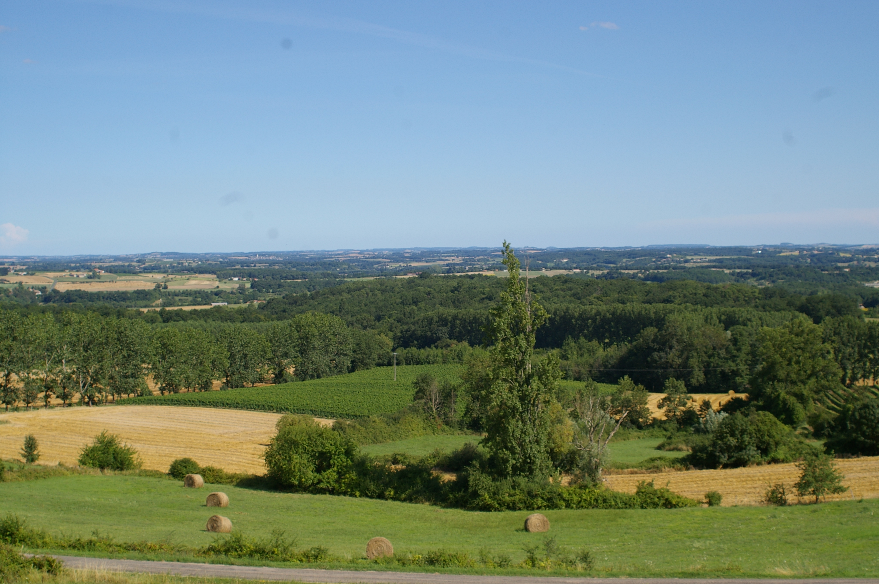 Paysage de Soumensac Date de prise de vue : Août 2006 Auteur : Annie Collin